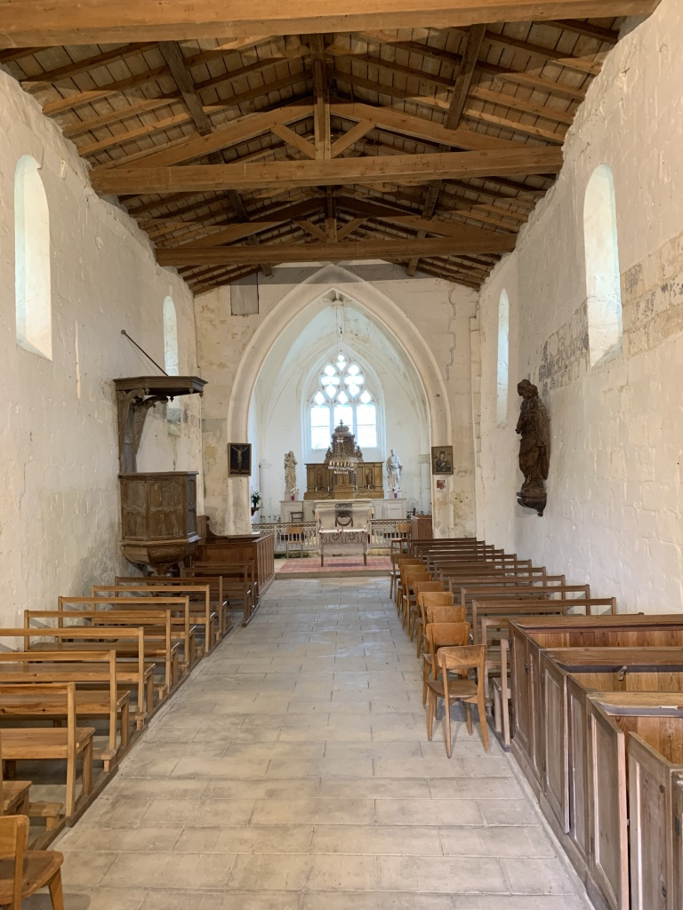 L'intérieur de l'église, avec à droit la statue représentant la Vierge à l'Enfant